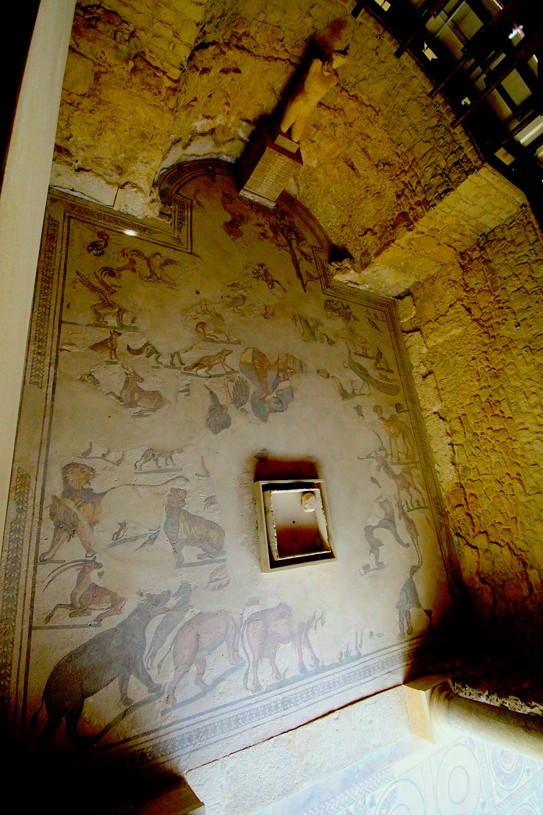 Ancient Roman mosaics in Villa del Casale (Piazza Armerina)